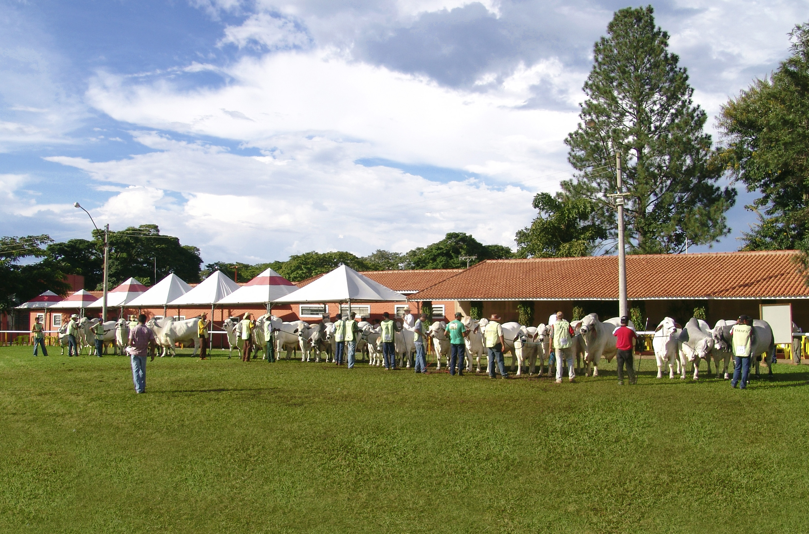 Touro da raça Brahman, em julgamento na EMAPA, Avaré, São Paulo, Brasil